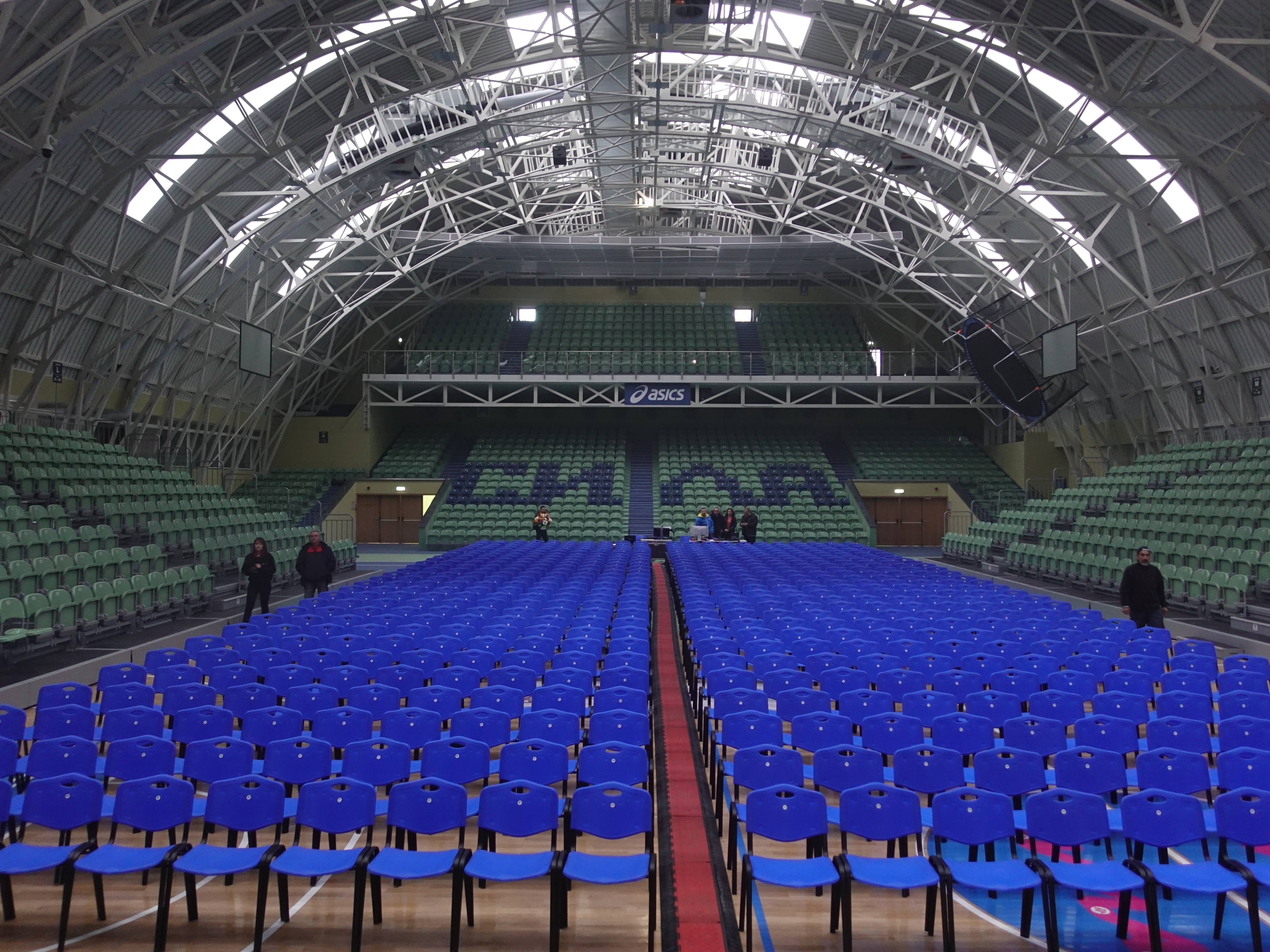 Залата на Комплекс С.И.²Л.А. - примерна подредба за концерти